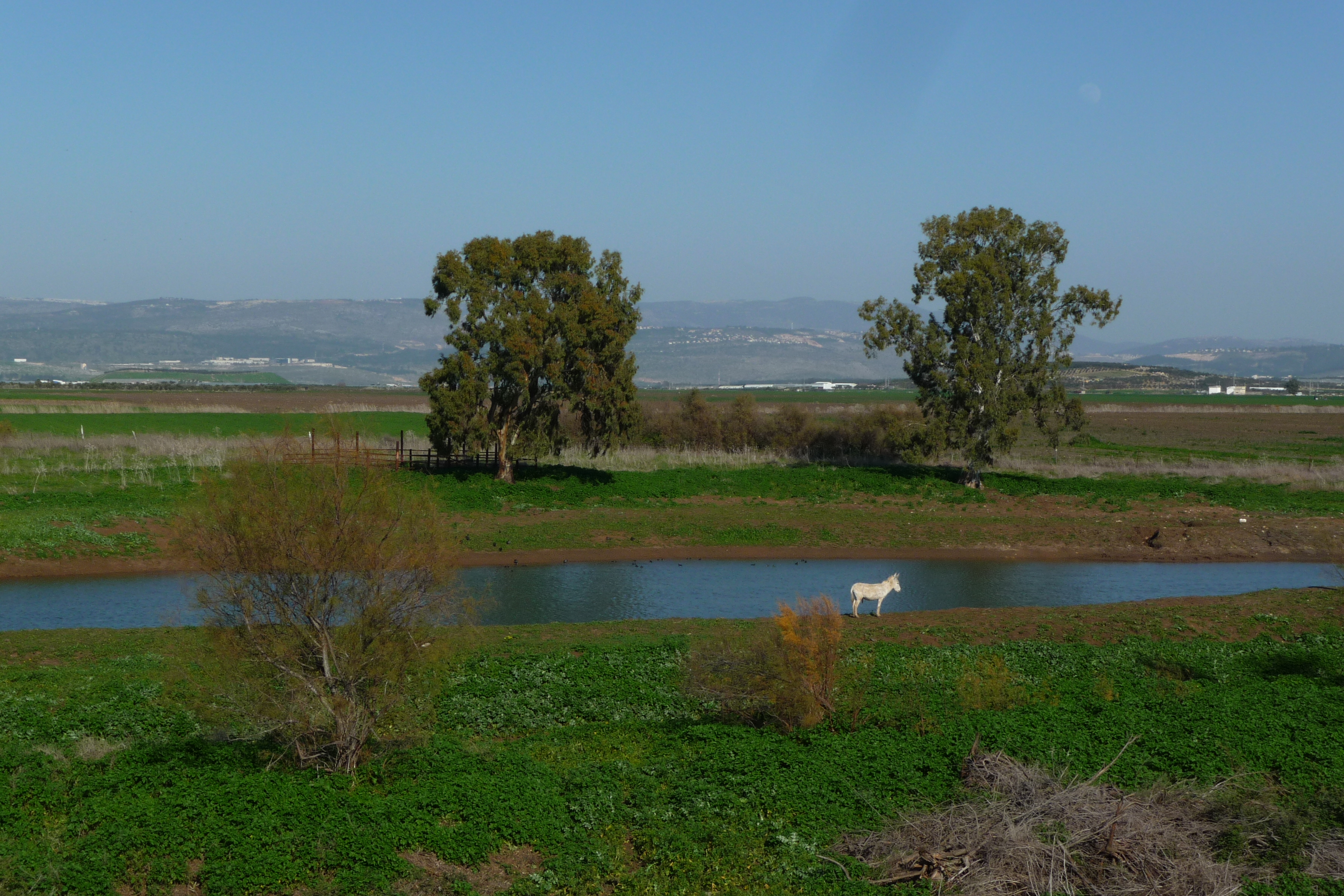 שמורת טבע בעמק זבולון, מזרחית לקריית ביאליק. השמורה כוללת הן את המעיינות והביצות המהווים את מקורו של נחל נעמן והן את האתר הארכאולוגי תל אפק. השמורה הוכרזה ב-1979 והיא משתרעת על פני 660 דונם. ב-1996 הוכרה השמורה כ"אתר רמסר" בהתאם לאמנת רמסר לשימור ולפיתוח בר-קיימא של בתי גידול לחים.